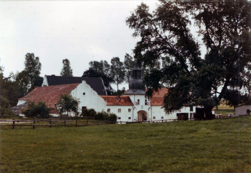 Gut Muthagen Nähe Geilenkirchen